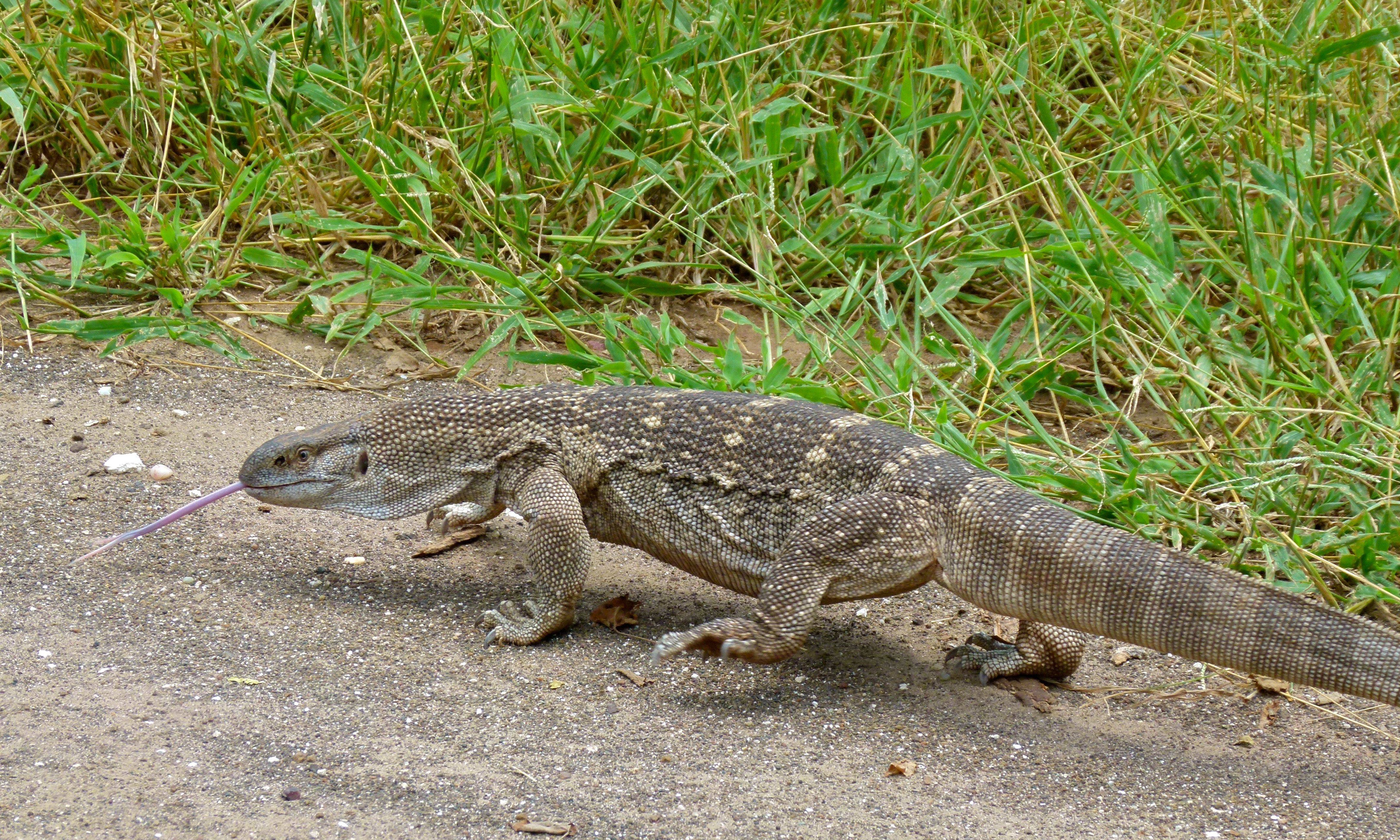 S63 near Pafuri, Kruger NP, SOUTH AFRICA